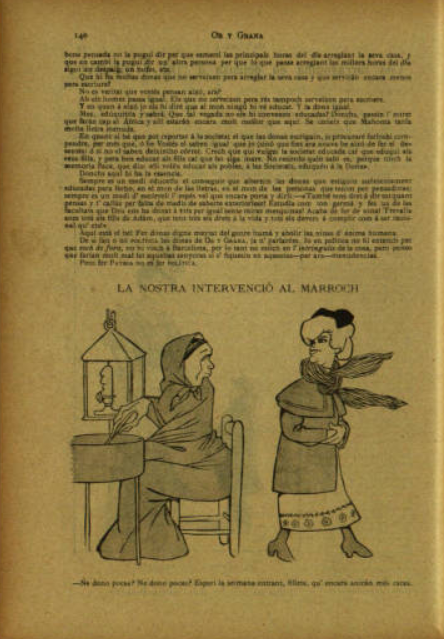 pàgina amb acudit d'or y grana